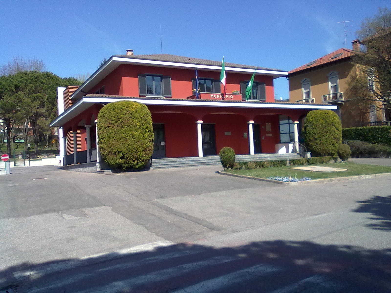 Il municipio di Saltrio